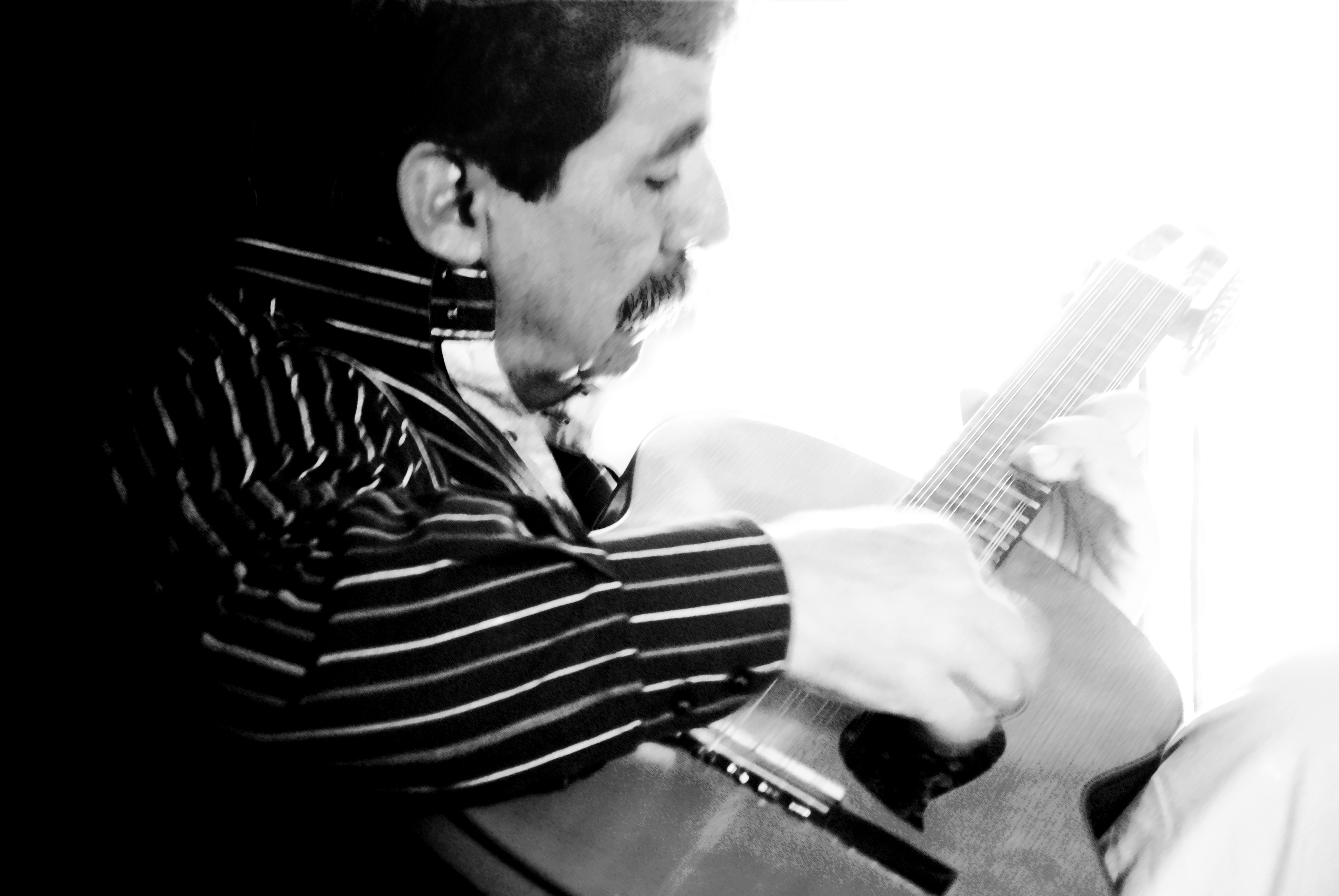 El Maestro Pedro Nel Martínez, El Tiple de Oro de Colombia